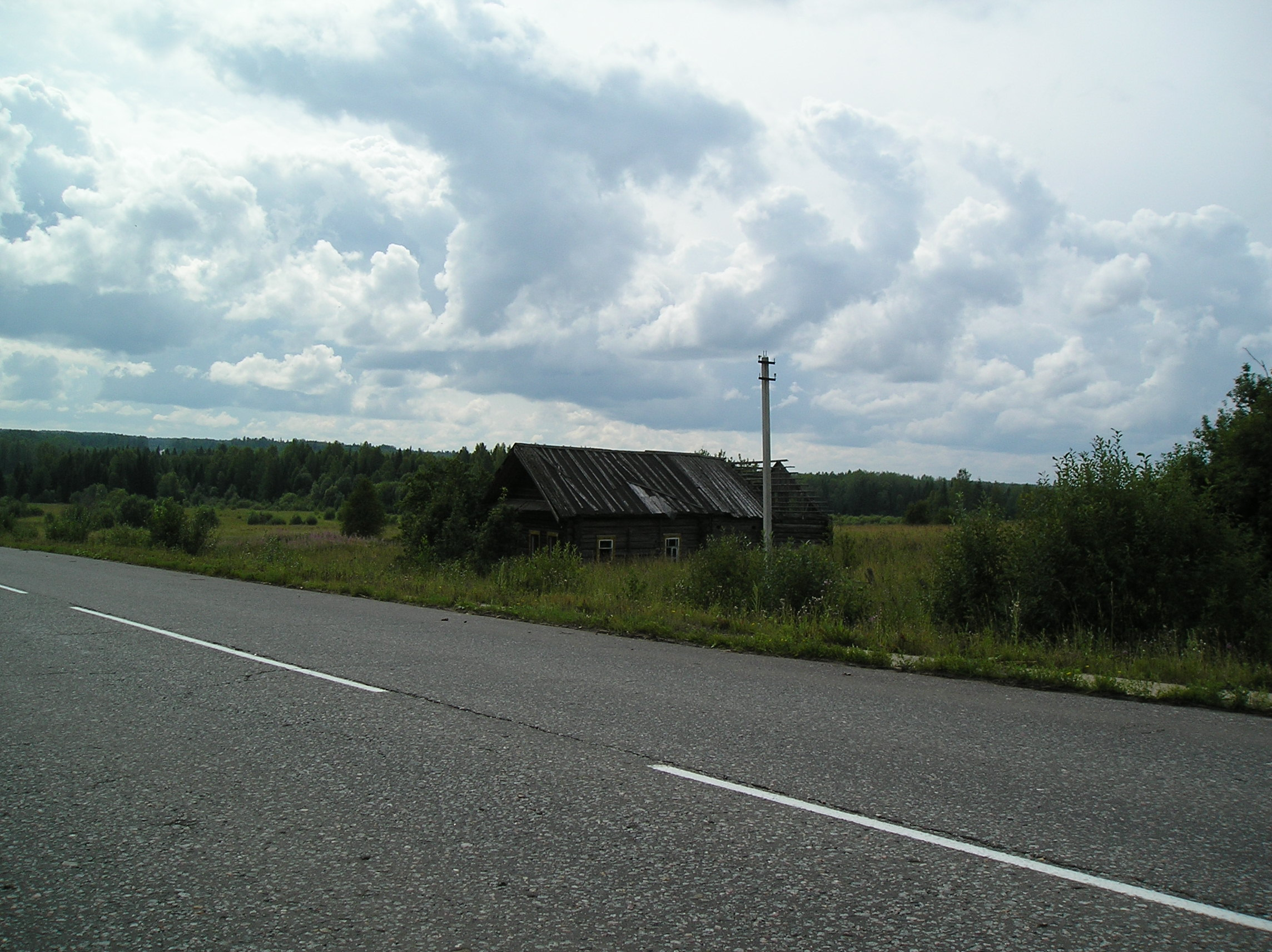 Дом.